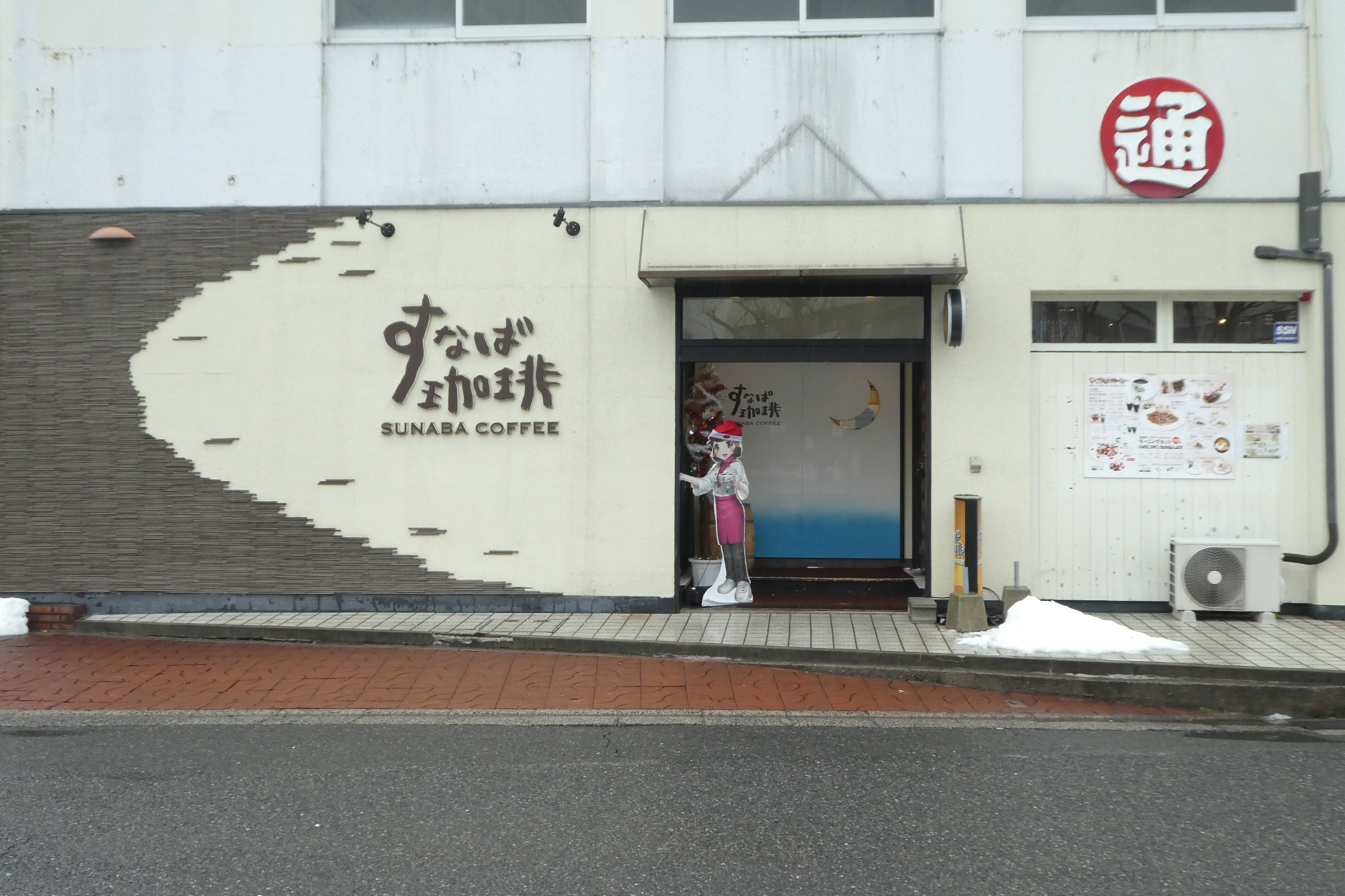 すなば珈琲鳥取駅前店。